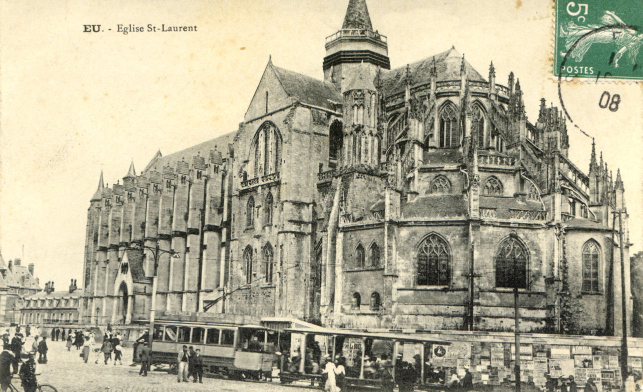 Tramway d'Eu-Le Tréport - La collégiale Notre-Dame et Saint-Laurent à Eu